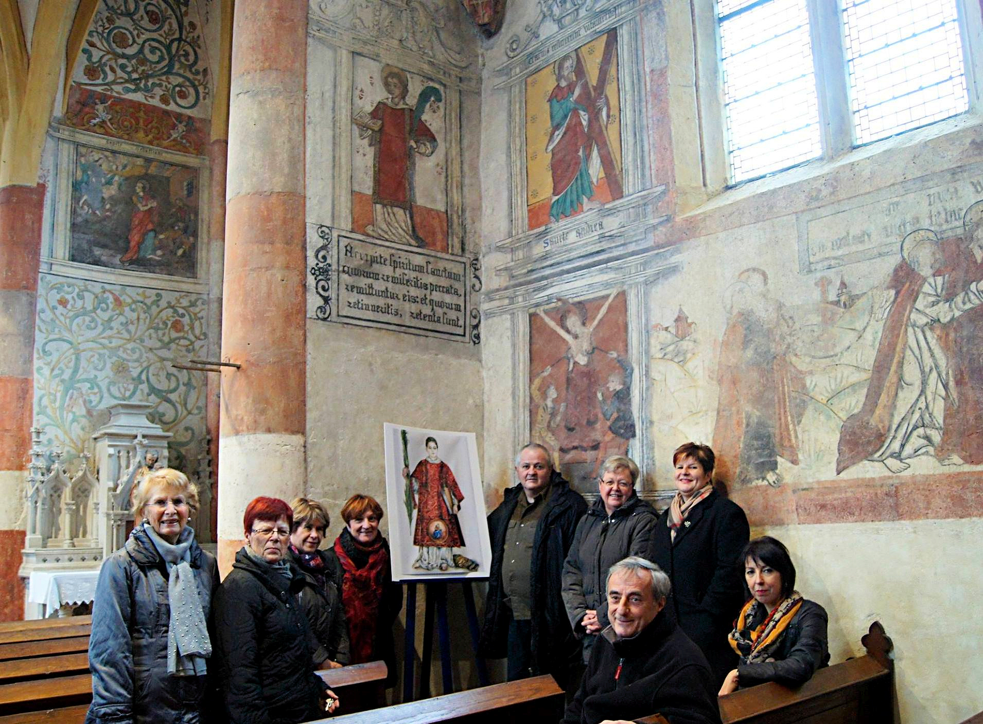 Esposizione dell'icona di S. Cesario in corrispondenza dell'antico affresco "St. Césaire diacre" (XV secolo); Église Saint-Martin de Sillegny, denominata "Sixtine Lorraine" o "Sixtine de la Seille".